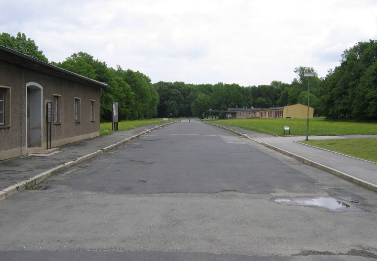 Caracho-Weg, KZ Buchenwald